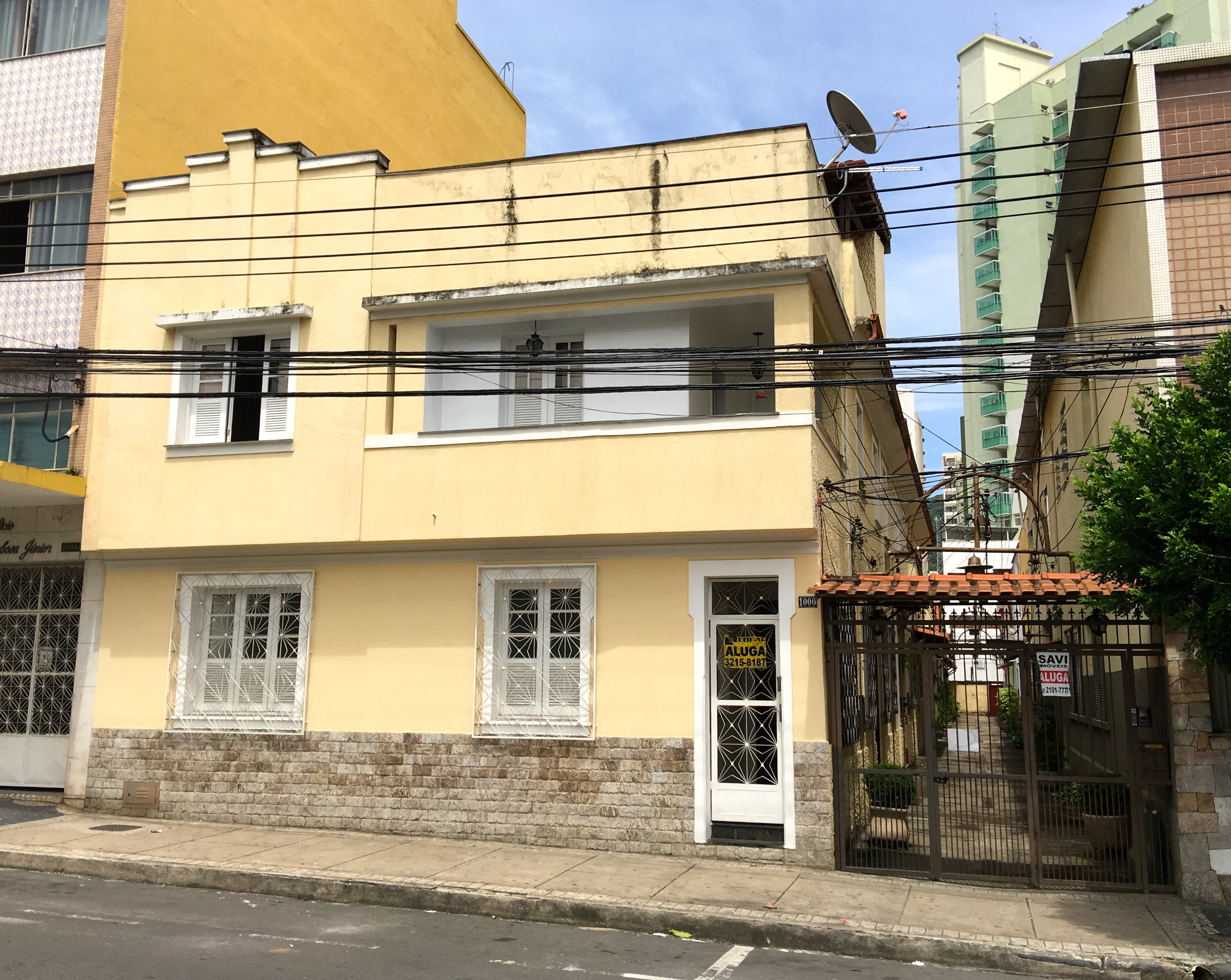 Casa da Rua Batista de OIlveira, 1000, Juiz de Fora (MG), de onde Francisco Valle saiu para o suicídio em 20 de março de 1906